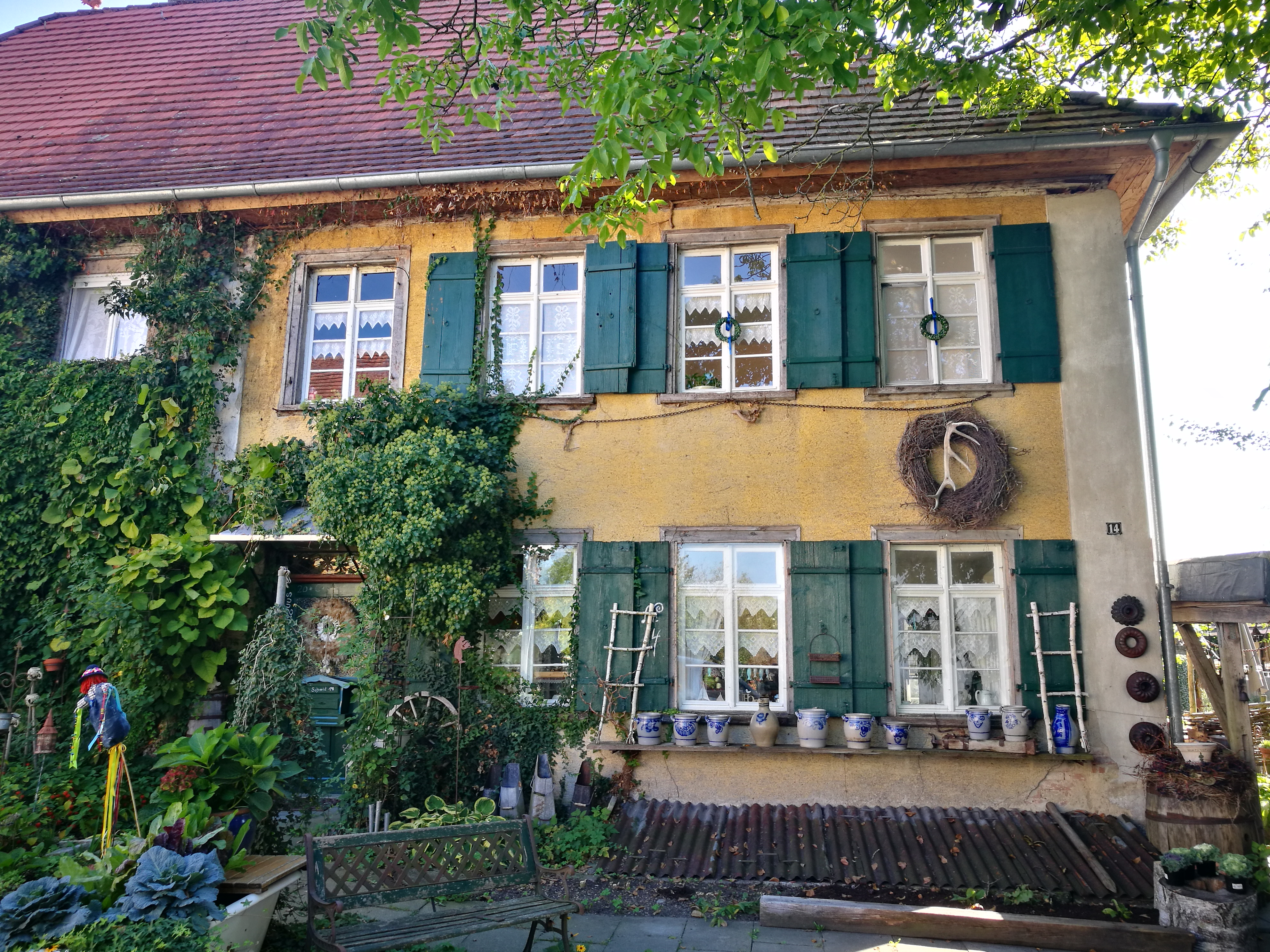 Deutschland (D) - Baden-Württemberg (BW) - Bodenseekreis (FN) - Friedrichshafen - Stadtteil Fischbach: Zweite Fischbacher Schule (1853-1905) / Station 5.22 des Geschichtspfads Friedrichshafen